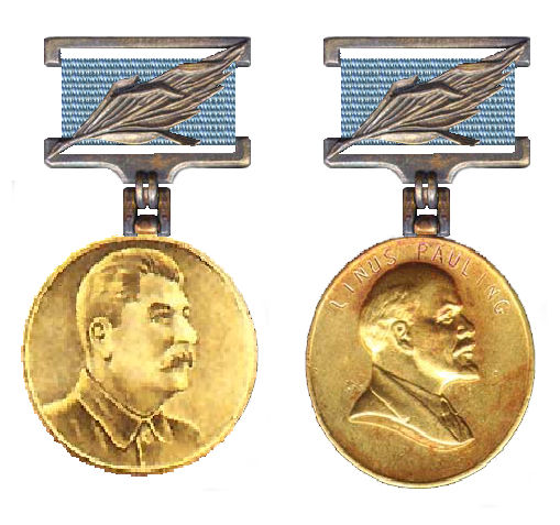 Medailles van de laureaten van Stalin-Vredesprijs (1950 - 1955) en Lenin-Vredesprijs (1955 - 1991)